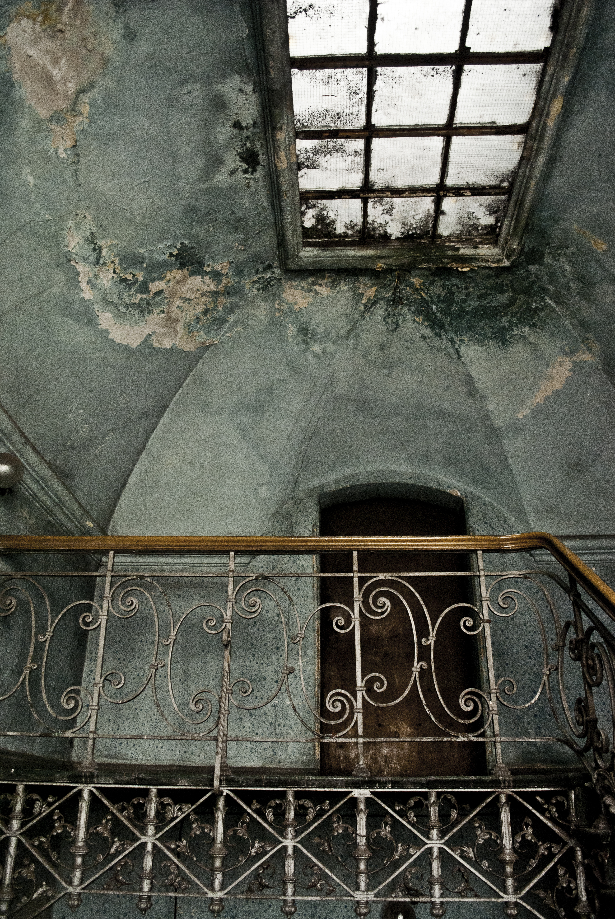 Kamienica przy ulicy Jainty 18 - wnętrze nr rej. 1351 z 16 września 1987